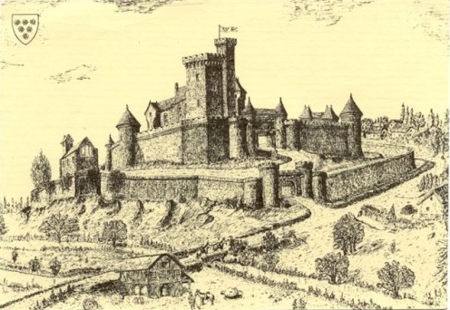 Château Fort des Molay Bacon au 15e siècle, dessin de Robert Evrard selon les indications d'Arcisse de Caumont